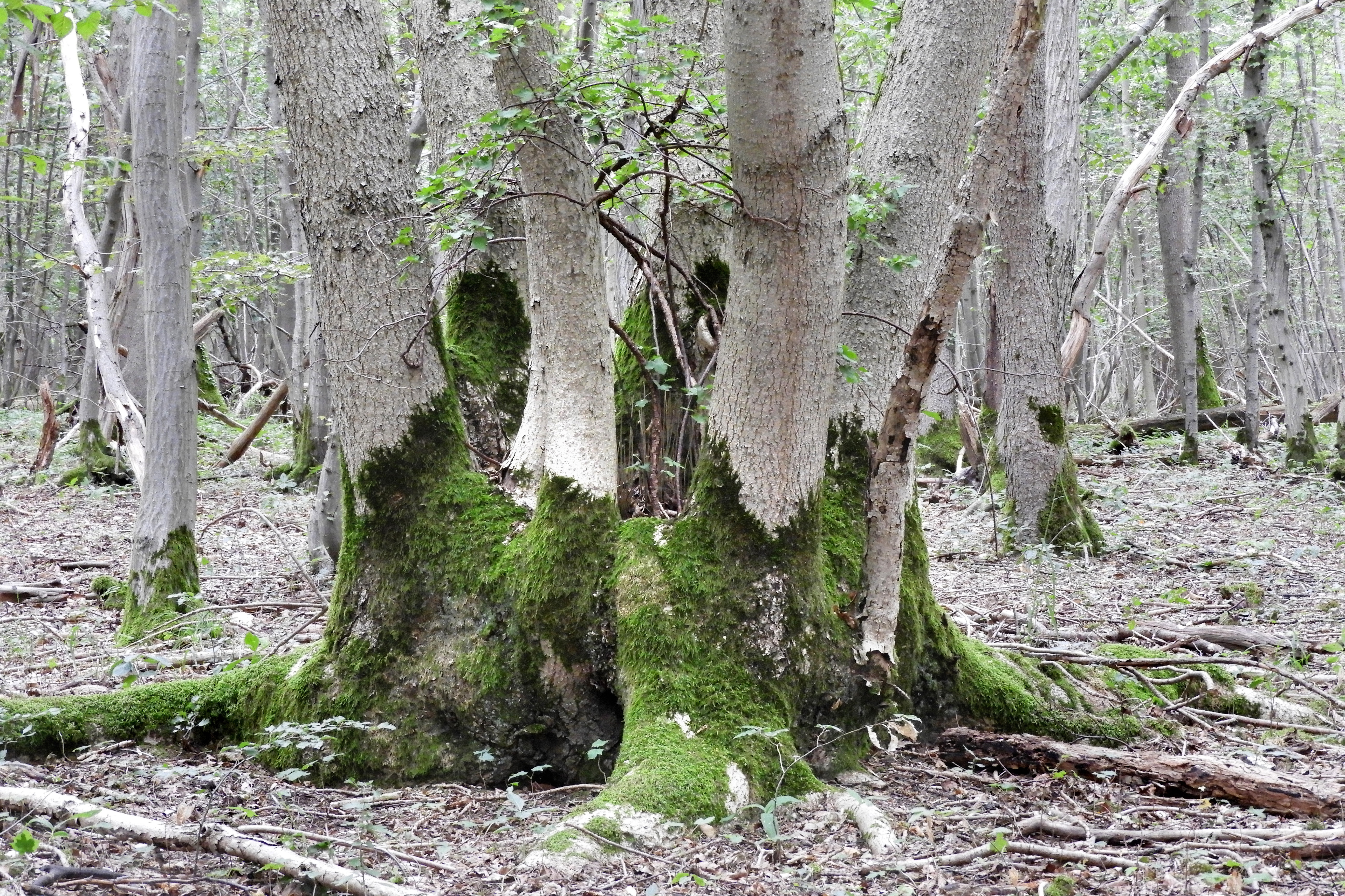 Die Graburg im nordhessischen Ringgau ist ein Bergstock aus Muschelkalk, der über einem Sockel aus Oberem Buntsandstein, der Röt genannt wird, liegt. Naturnahe Kalkbuchenwälder, Felsen und Bergstürze prägen das Gebiet in besonderer Weise. Wegen ihrer landschaftlichen Schönheit und Eigenart sowie ihrer Bedeutung als Lebensraum für seltene und bestandsgefährdete Tier- und Pflanzenarten wurde die Graburg in dem Jahr 1915 als Naturdenkmal und ab Mai 1965 als Naturschutzgebiet unter besonderen Schutz gestellt. Als Wuchsort seltener Pflanzengesellschaften und aufgrund ihres außergewöhnlichen floristischen Reichtums wird die Graburg zu den bedeutendsten Naturschutzgebieten in Hessen gezählt. Die hier vorhandenen zahlreichen Vegetationseinheiten, die in großer Vielfalt und einer charakteristischen Abfolge vorkommen, gelten als wertvoll für Forschung und Lehre. Als besonders schutzwürdig werden auch die orchideenreichen Kalkmagerrasen, der hessenweit größte Eibenbestand, die großen Bergstürze mit ihren Blaugrashalden sowie die zahlreichen Höhlen in den Felsbereichen als Winterquartiere für gefährdete Fledermausarten angesehen.